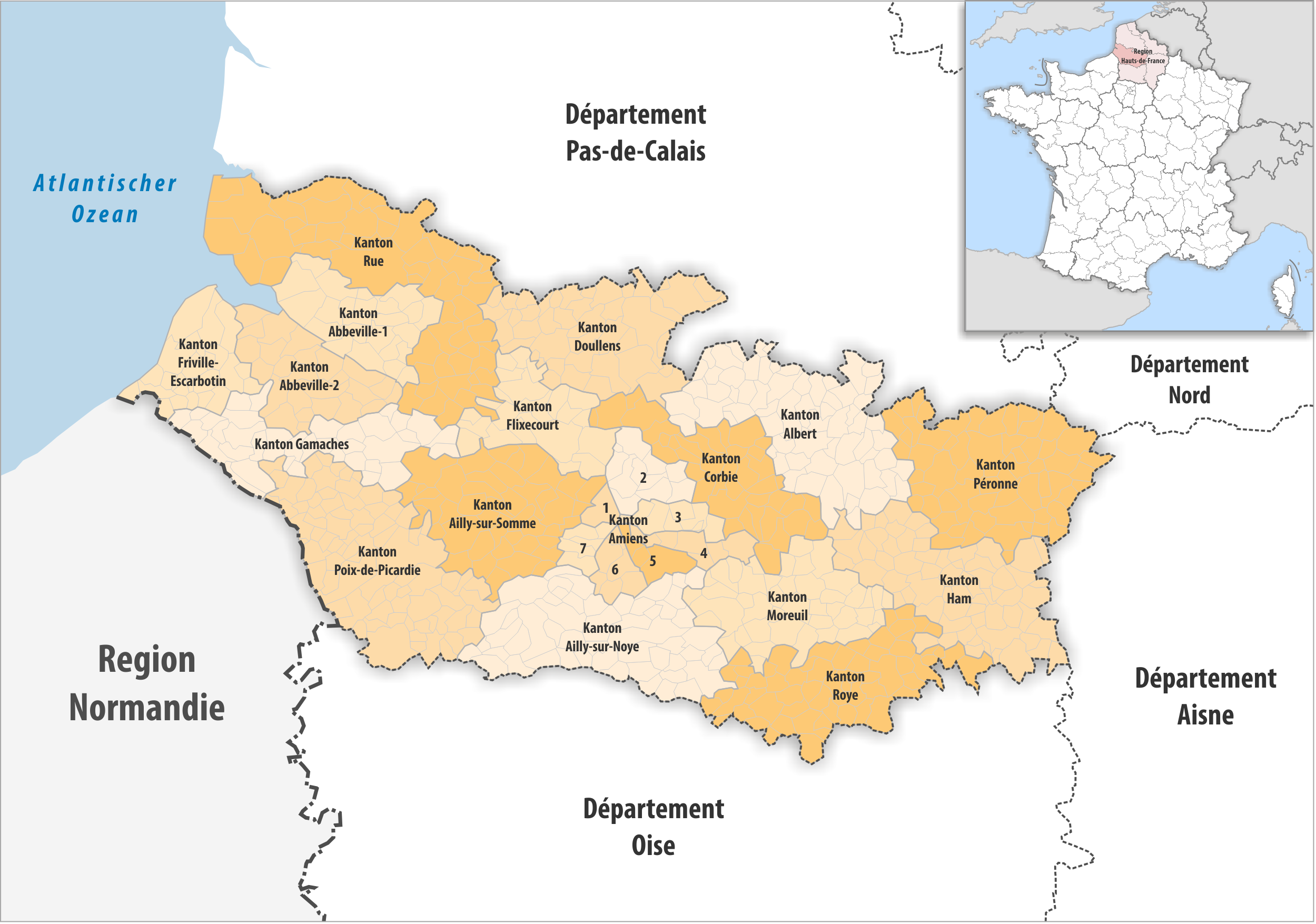 Gemeinden und Kantone im Departement Somme